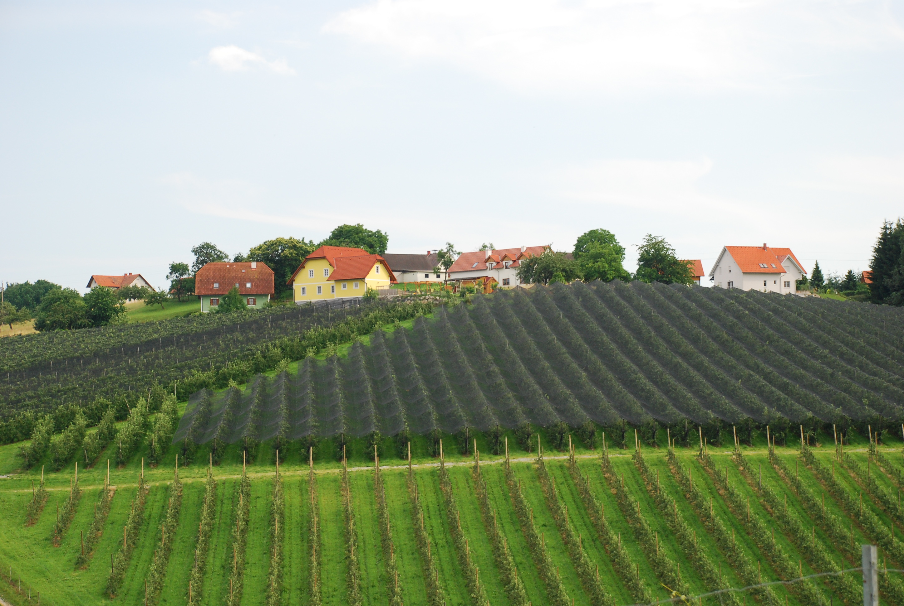 Obstkultur in Nestelbach im Einzugsgebiet der Laßnitz